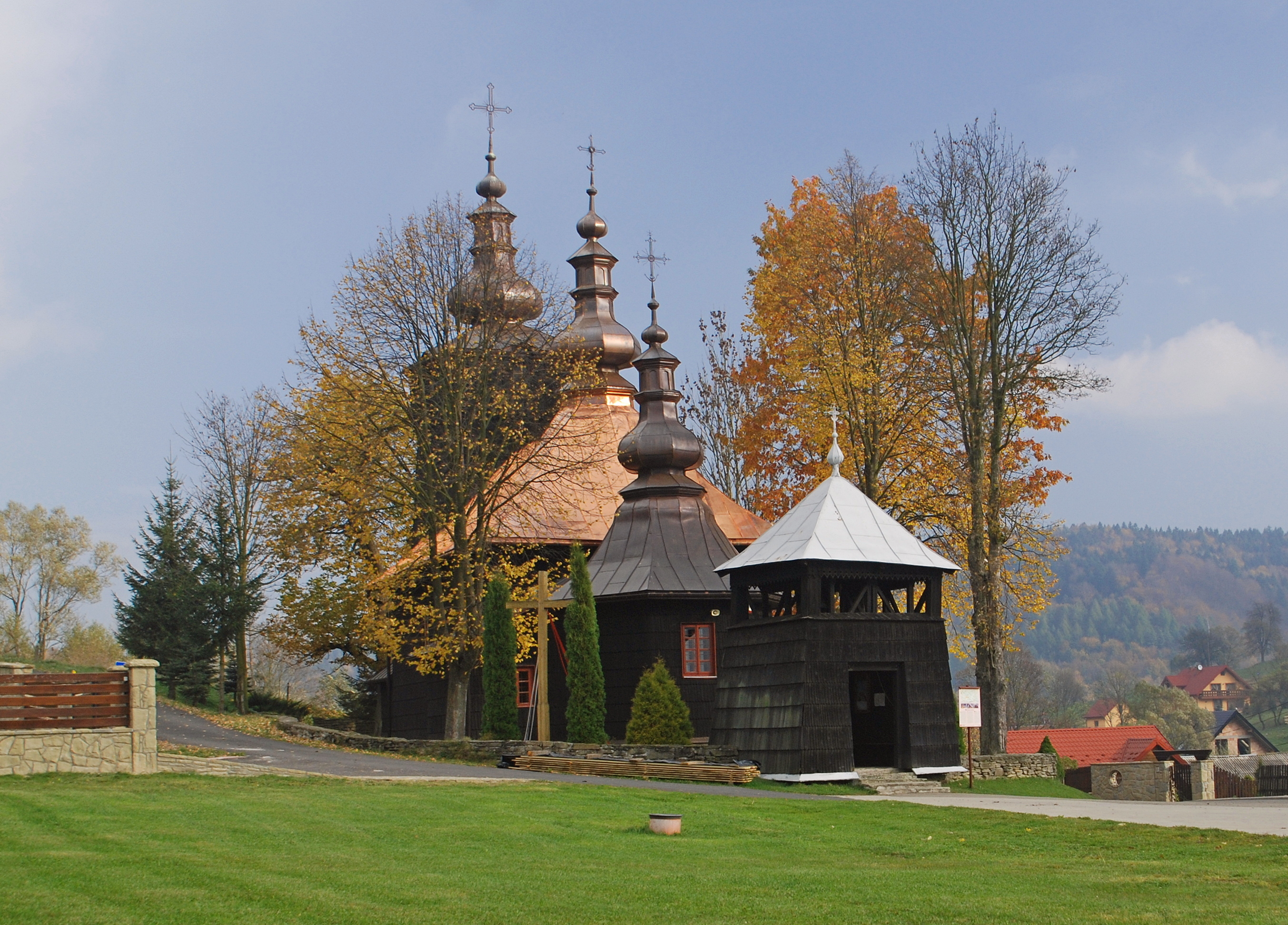 wieś Banica (gmina Uście Gorlickie)